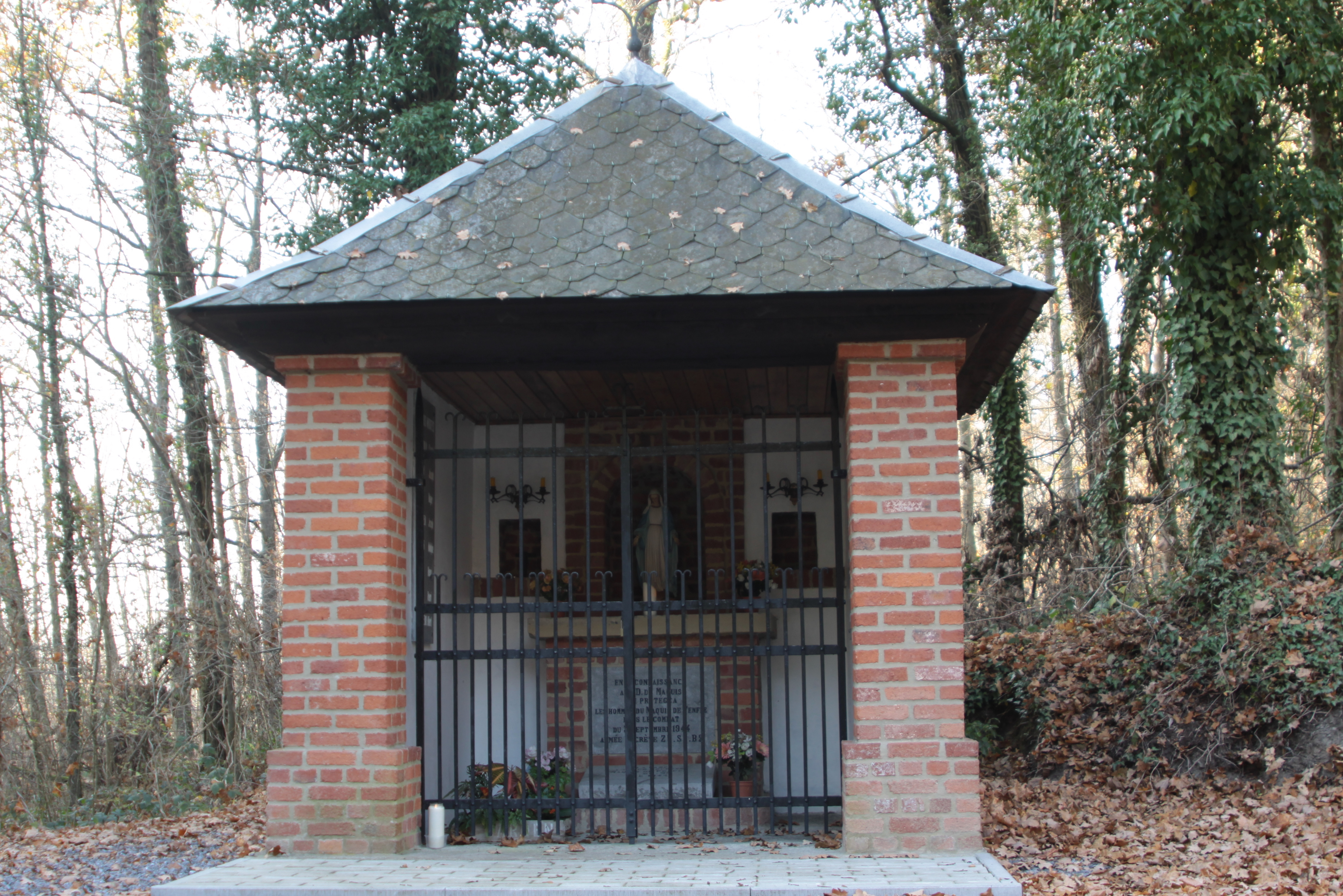 D'Kapell Notre-Dame du Maquis (2011)